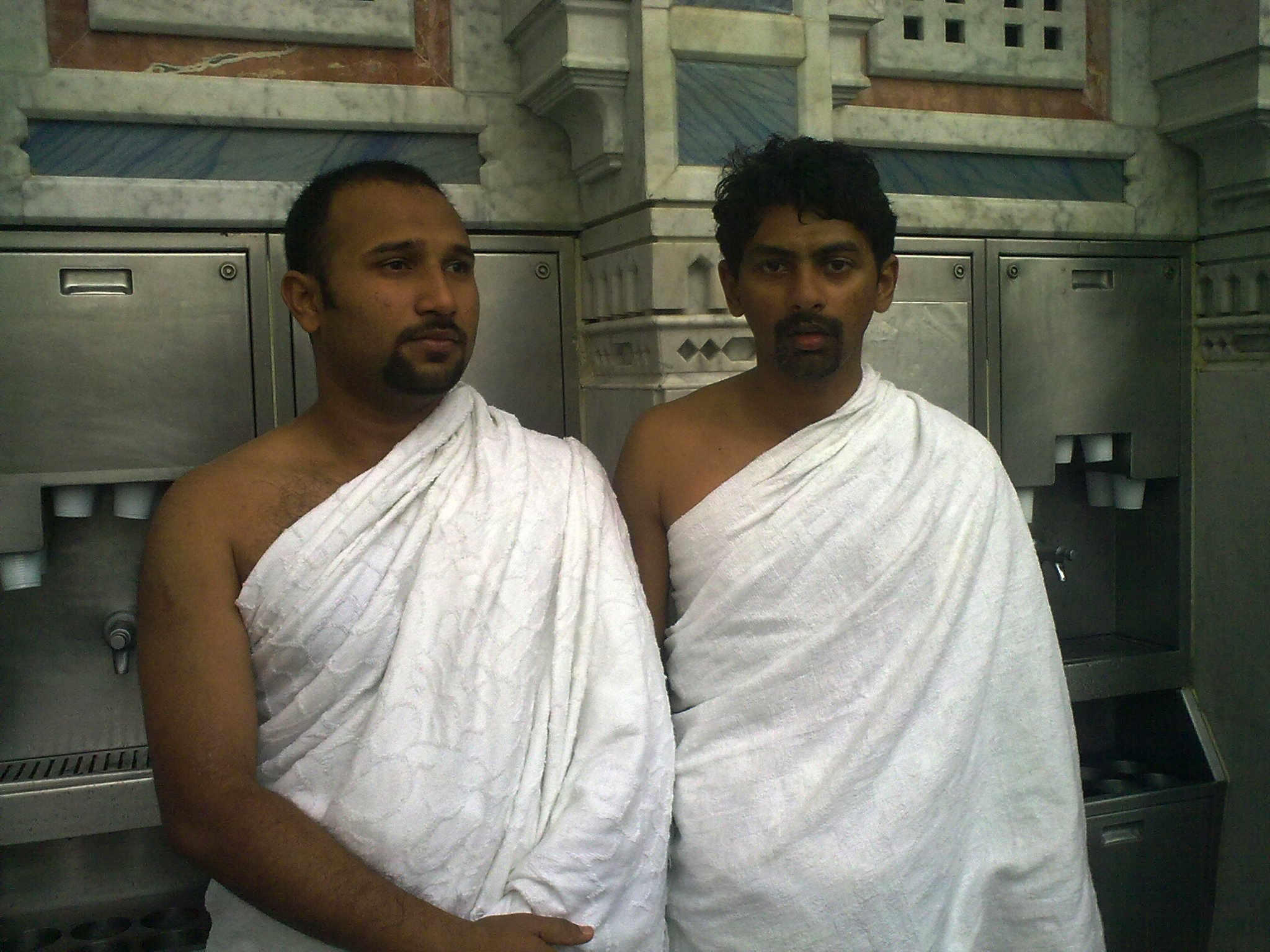 ഉംറ തീർത്ഥാടകർ